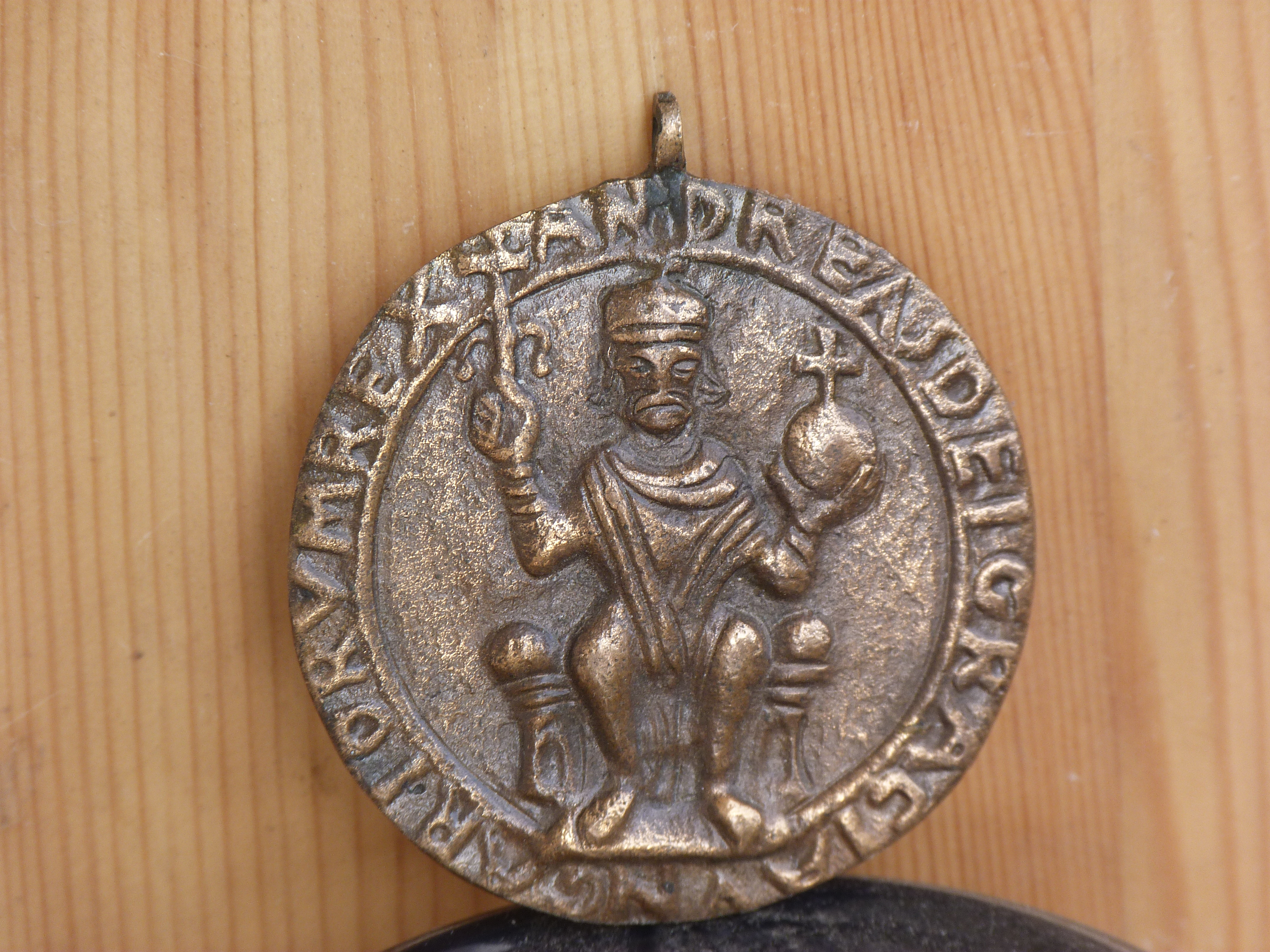 A felvétel 2012. szeptember 27 –én készült. A Budapesti 9. Számú Űgyvédi Munkaközösség emlékérme. (Budapest VI. ker. Hajós utca 17 szám). Az emlékérem címoldalán II. András király (1). Felirat a hátoldalon: 25 éves A 9. Sz. Ü.M.K 1951 – 1976 (2) ©© Megjelent Creative Commons alatt a Metapolisz sorozatban. A Metapolisz sorozat valamennyi képe és filmje Creative Commons alatti valamint kereskedelmi - for profit - célra is felhasználható. Ajánlott hivatkozás: Derzsi Elekes Andor: Metapolisz DVD line